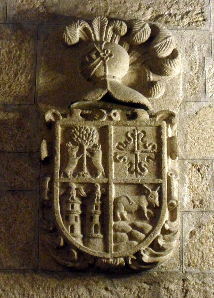 En el crucero derecho existe un escudo de armas del Licenciado Juan Fernandez de Mena, abad de Santiago de Trasariz y de Freás de Eiras. Debajo está su enterramiento, donde indica la fecha de1661